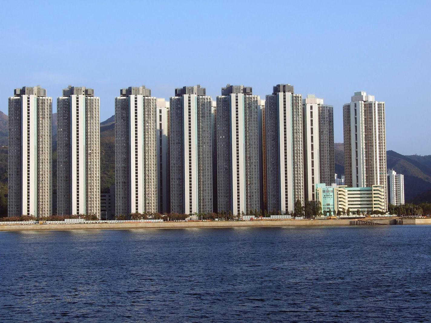 錦泰苑